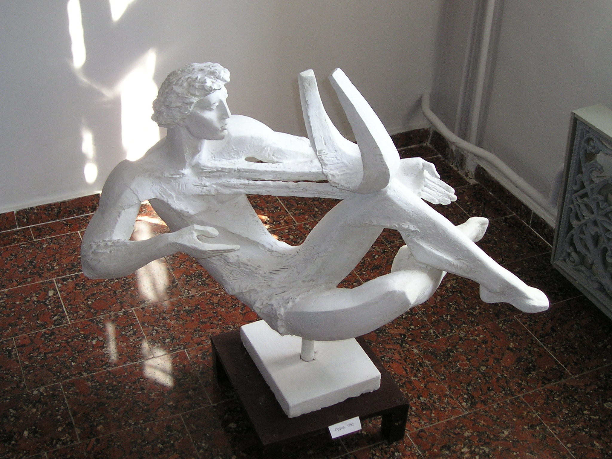 Константин Козловский. «Орфей», 1992 г., гипс, 92 см